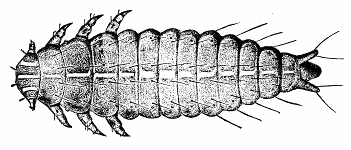 LARVA OF PLATYPSYLLUS CASTORIS — DORSAL VIEW